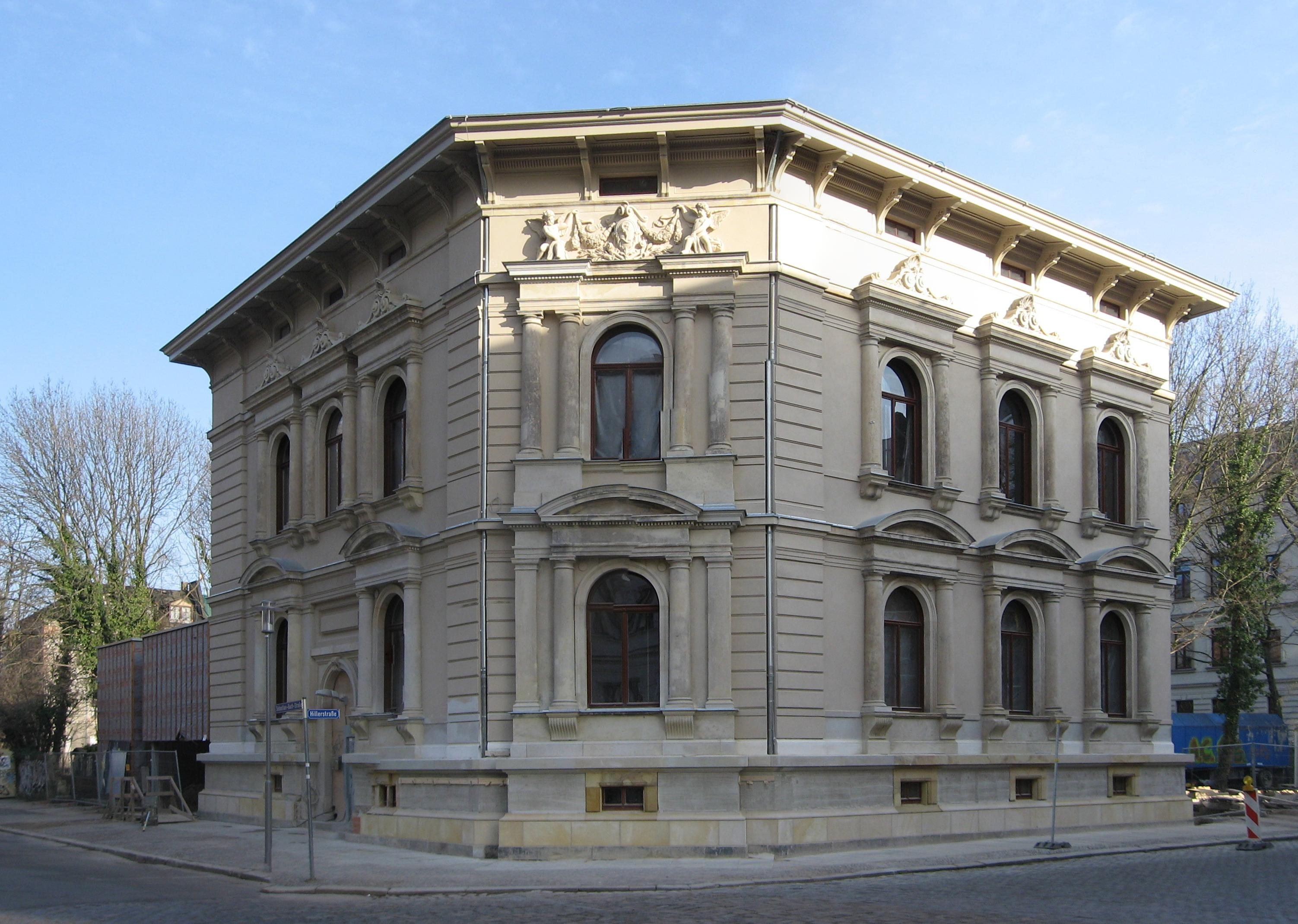 Leipzig, Wohnhaus Sebastian-Bach-Straße 3, heute Villa Thomana, erbaut 1881–83 von Max Pommer